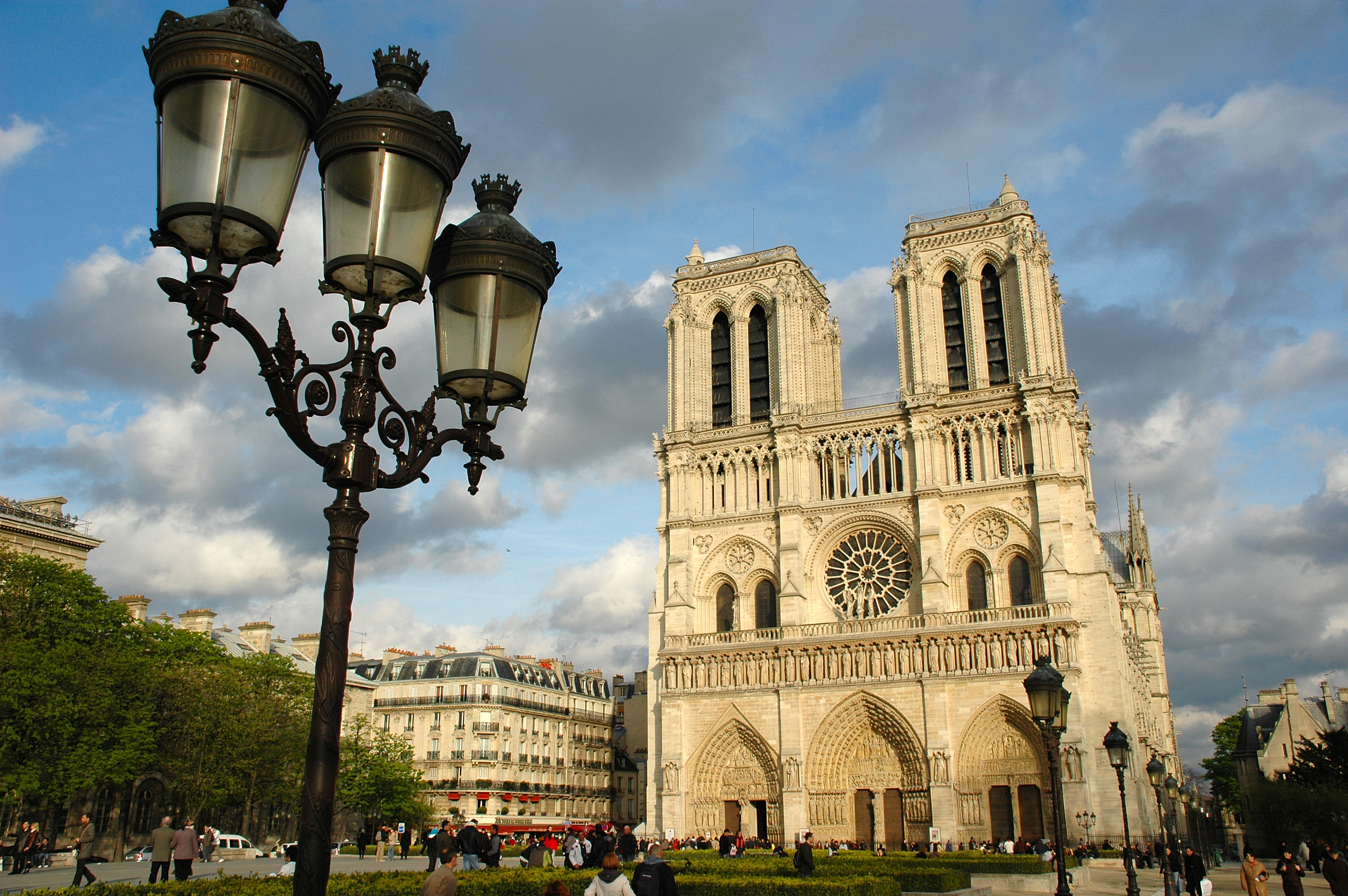 Notre Dame de Paris auf der Cité Insel mit Laterne / Kandelaber.